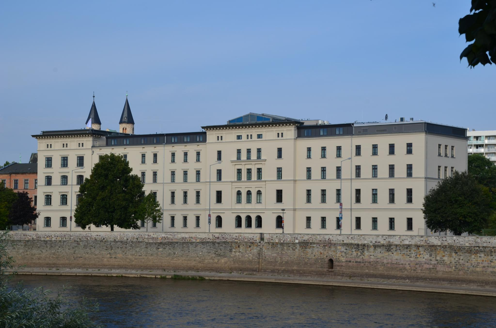 ehem. Reichsbahndirektion in Magdeburg, heute Kompetenzzentrum für Demenzerkrankte (Vitanas)